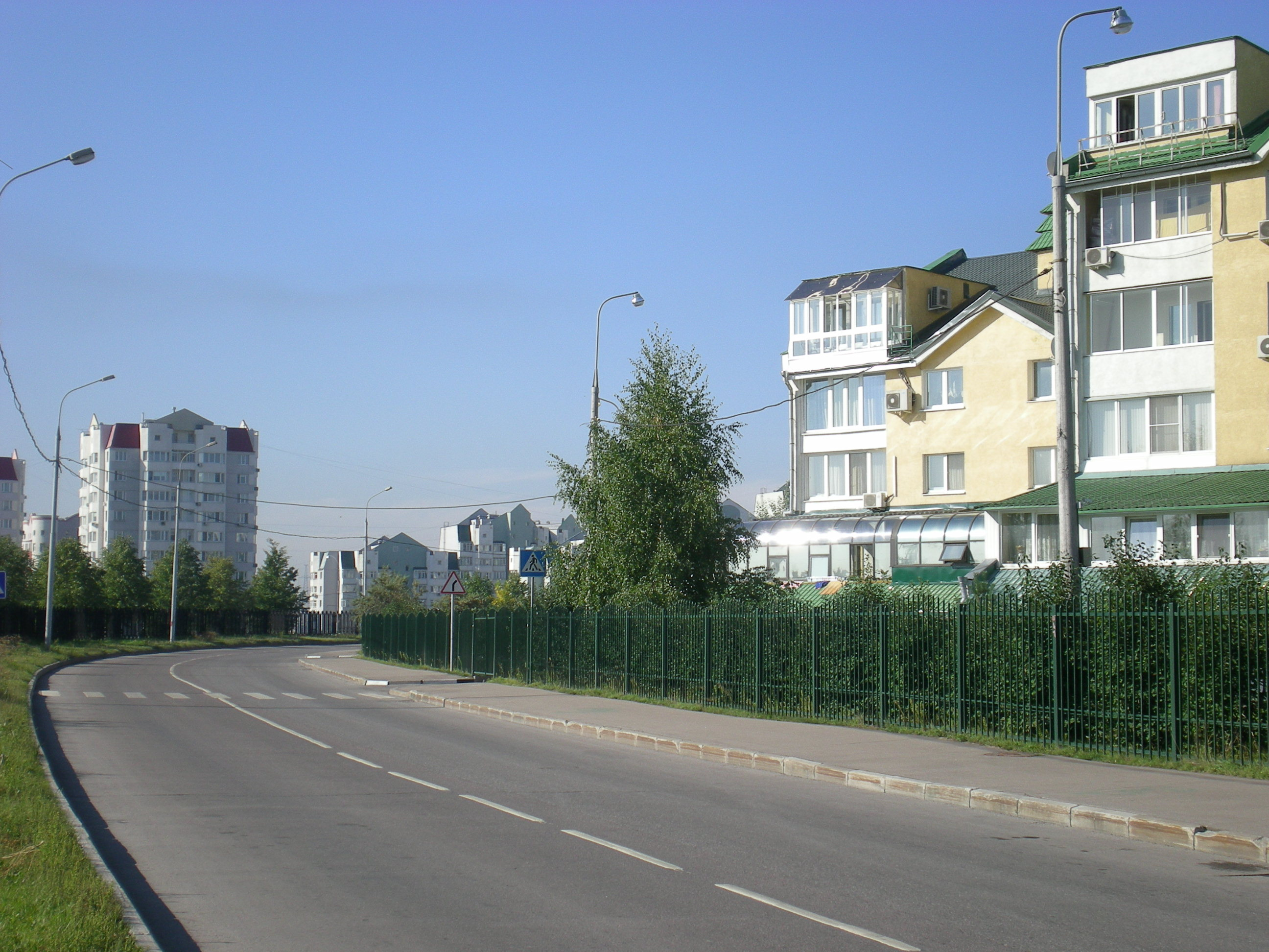 Пенягинская улица (Москва, Митино)